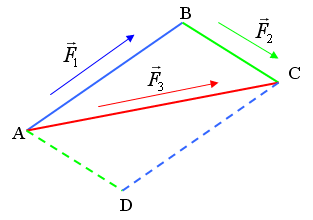 Parallélogramme des forces Auteur : Bertrand Coconnier, réalisé avec Word + Paint. Licence GFDL Bertrand Coconnier